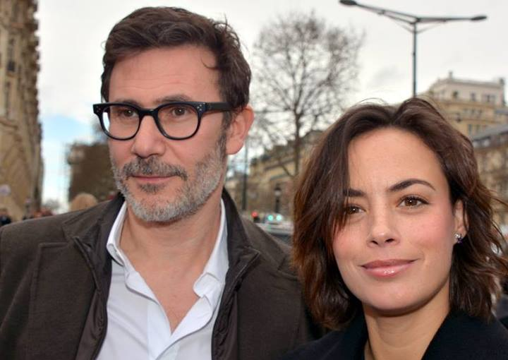 Michel Hazanavicius et Bérénice Bejo au déjeuner des nommés des César du cinéma